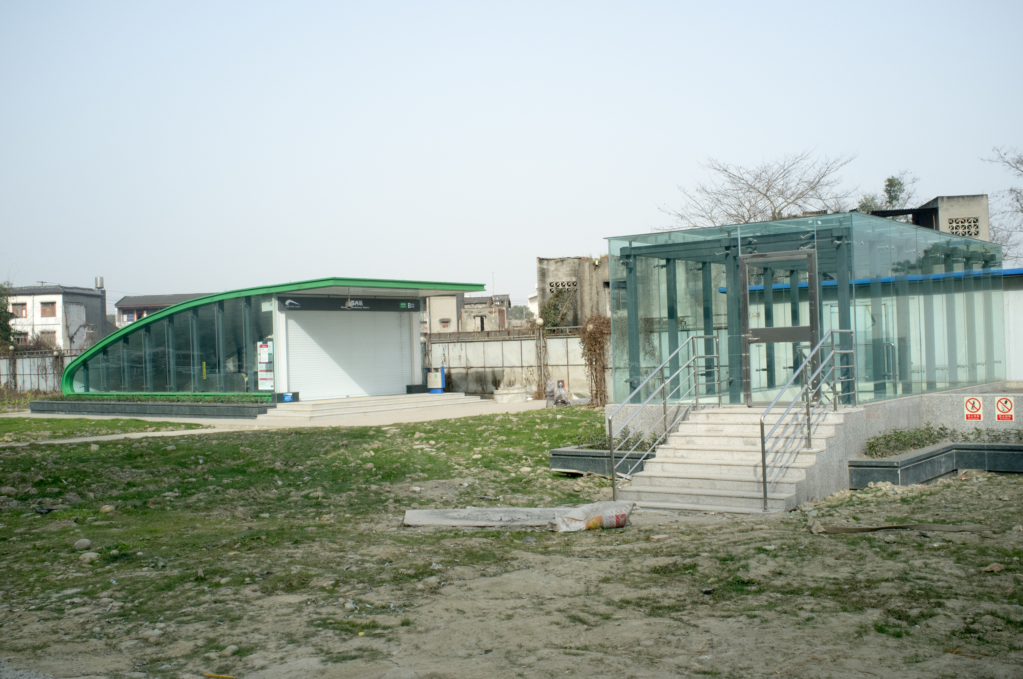 中文（中国大陆）: 地铁成都西站未启用出口